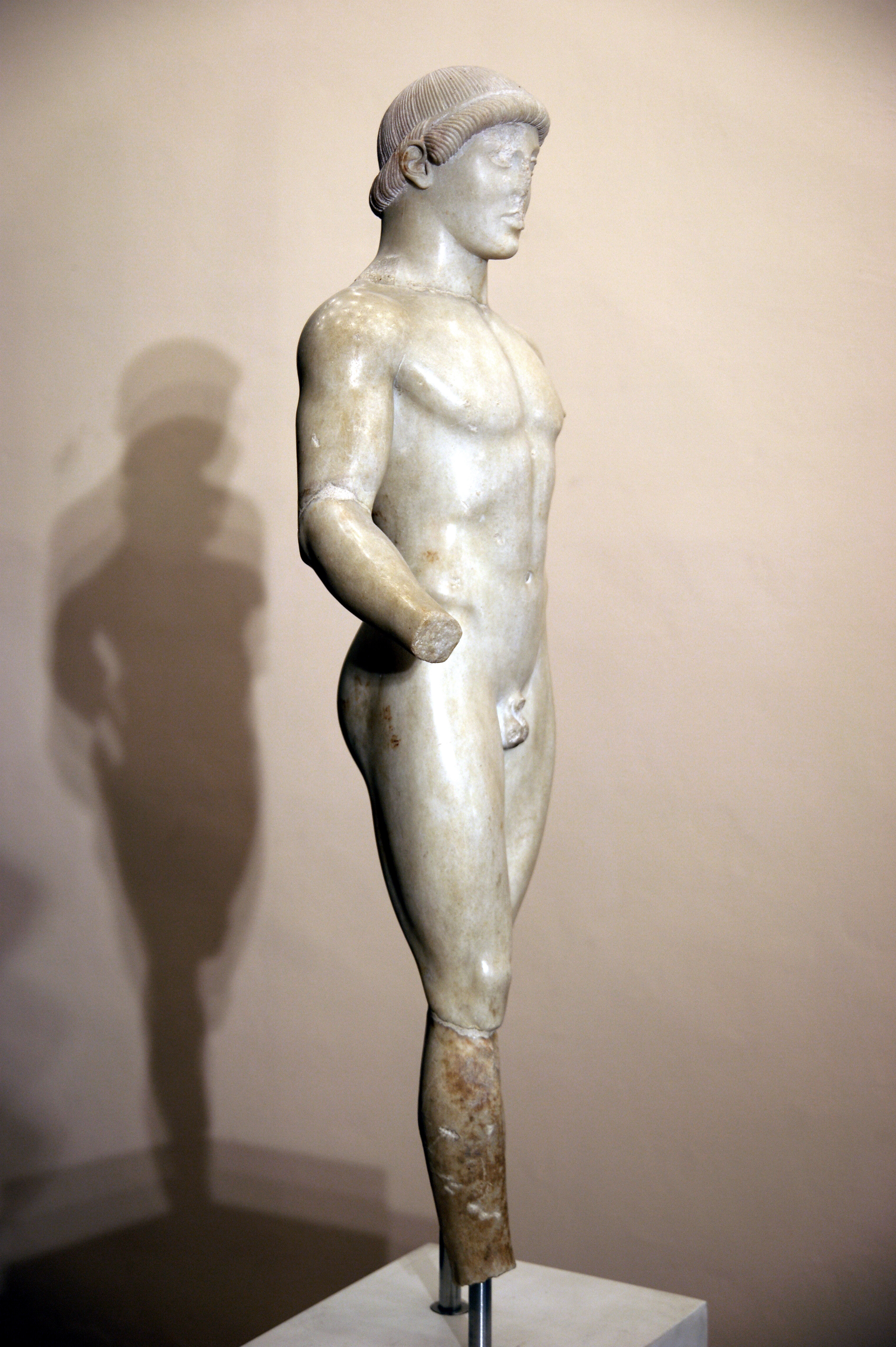 2009-03-22 03-29 Sizilien 686 Agrigent, Parco Valle dei Templi Agrigento, Museo Archaeologico